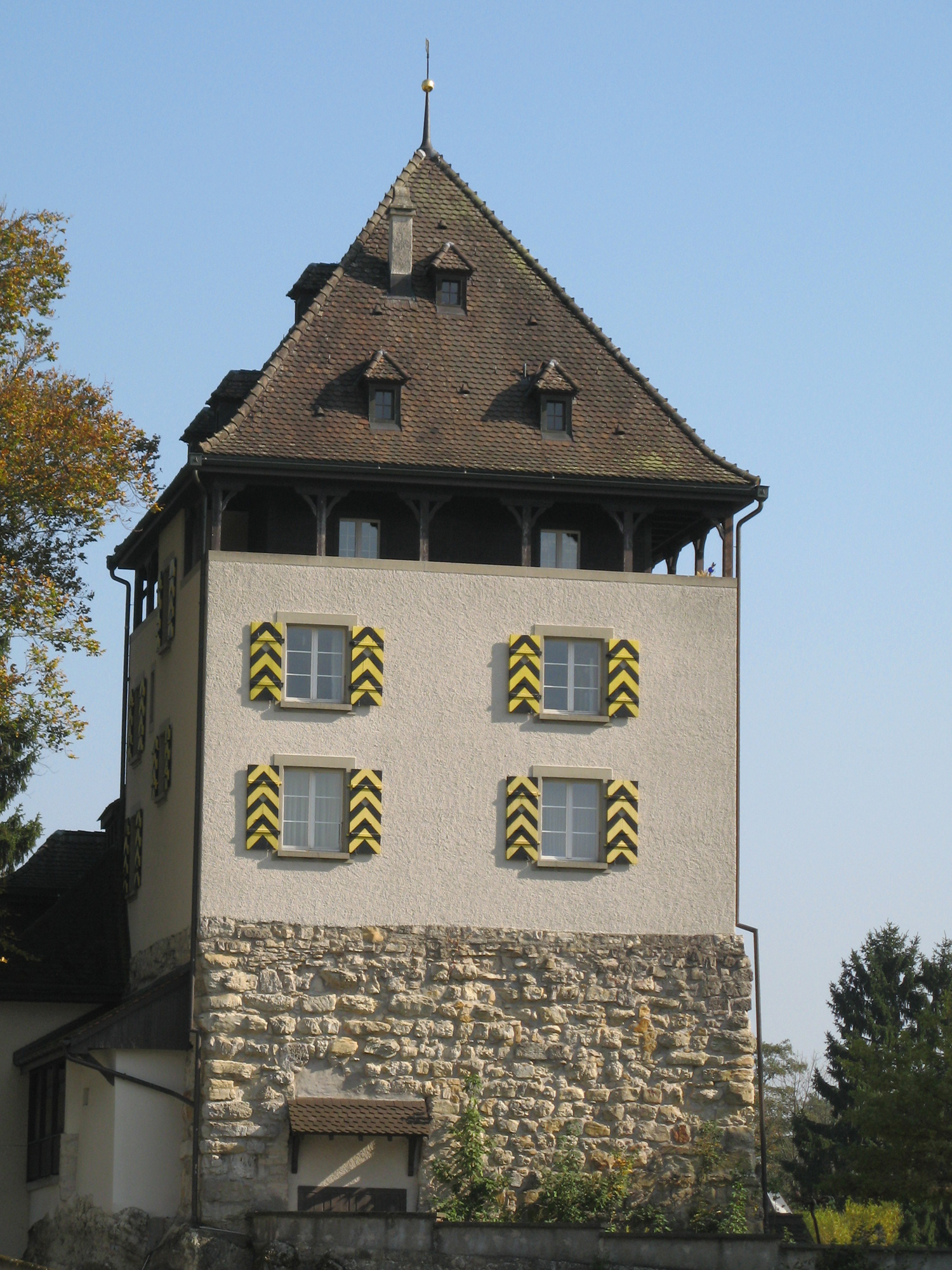 Schloss Auenstein